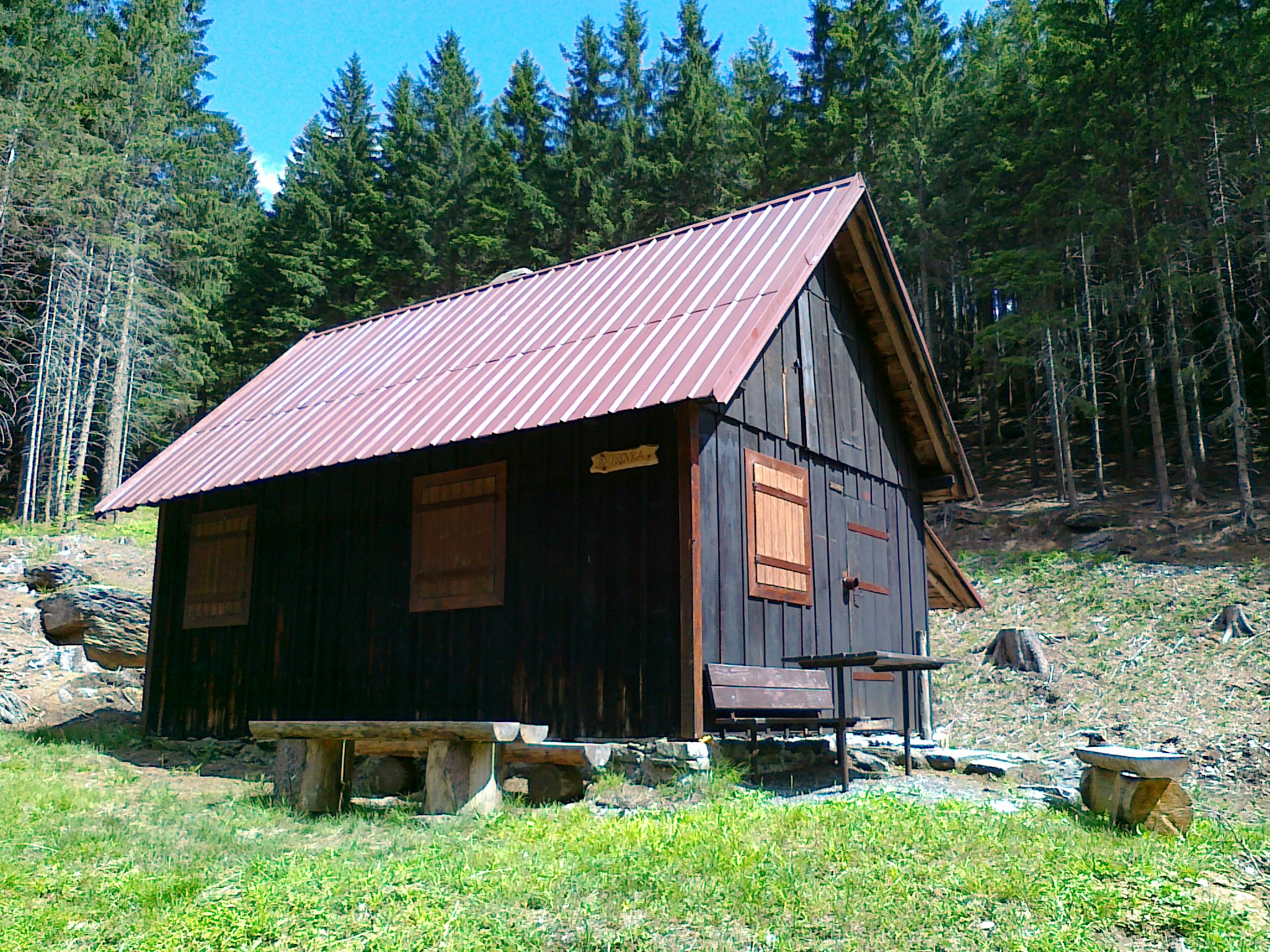 Chata Výrovka